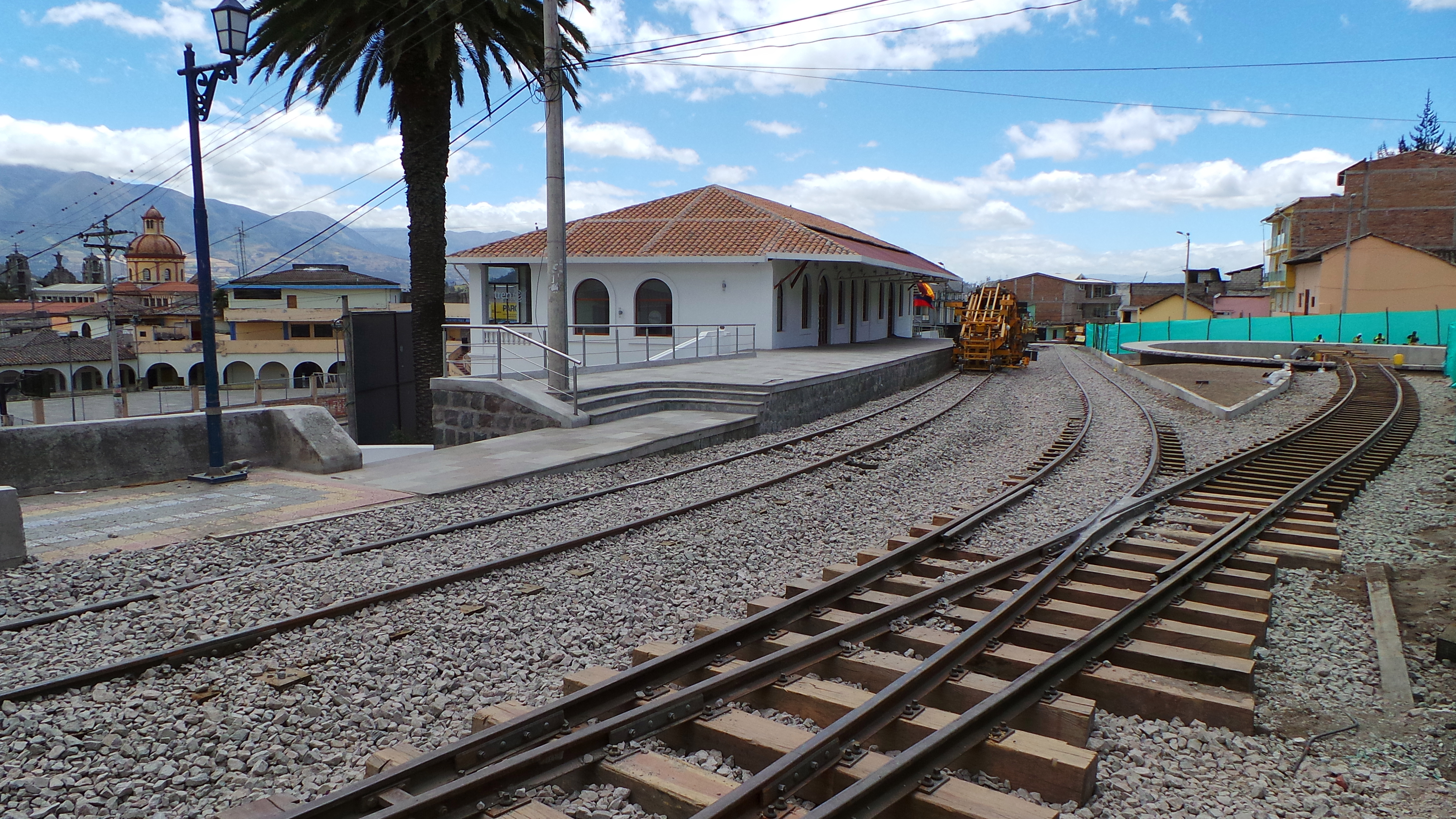 Recorrido ministra SM por provincia de Imbabura 29-07-2014 (11)